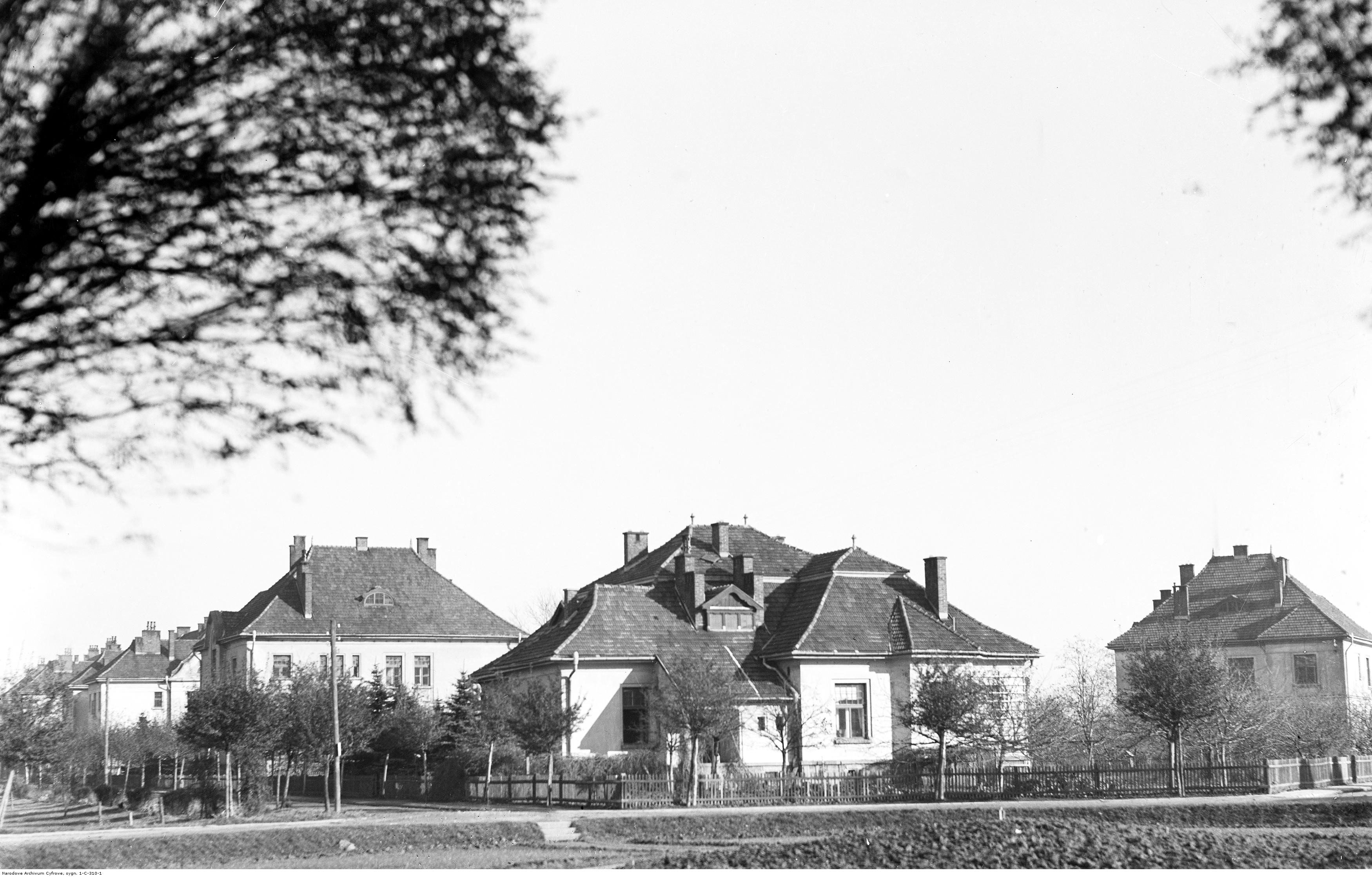 Zakład dla Nerwowo i Psychicznie Chorych w Kobierzynie: Budynki szpitala. Na pierwszym planie budynek dyrekcji